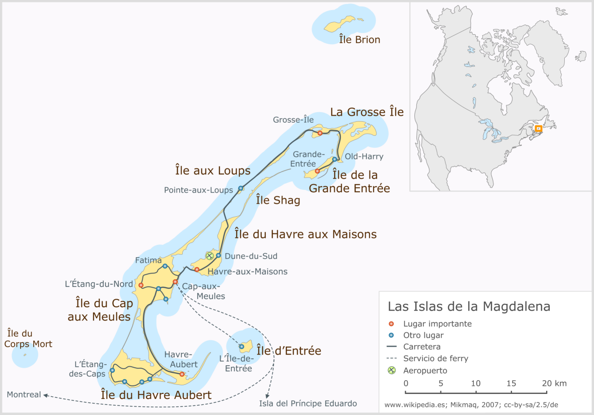 Islas de la Magdalena